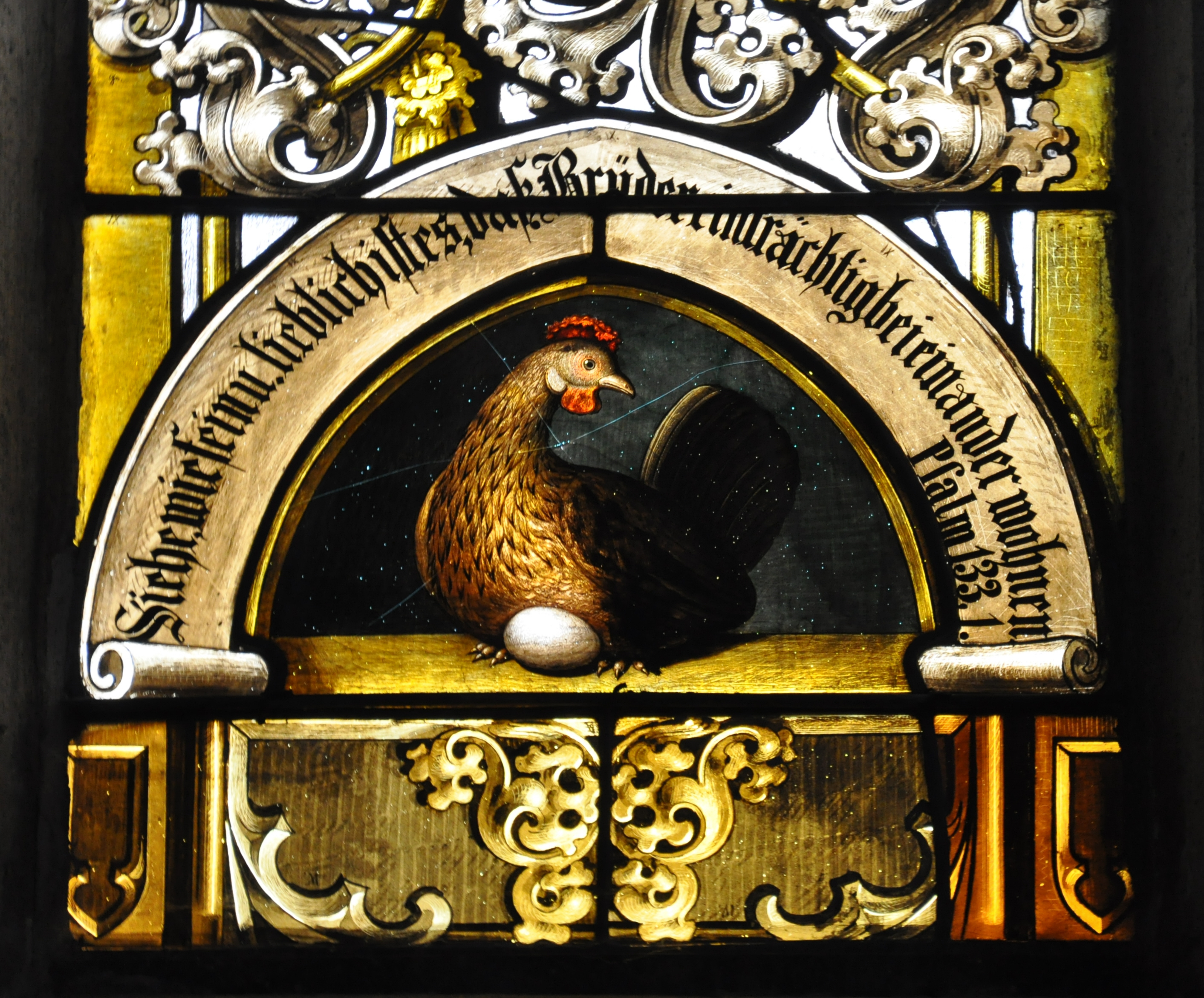 Evangelische Stadtkirche Ravensburg (ehem. Karmeliterkirche) Glasfenster des 19. Jahrhunderts: Johannes Brenz; Detail: Henne mit Ei